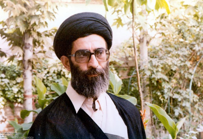 آیت الله خامنه ای در سال 1360 خورشیدی